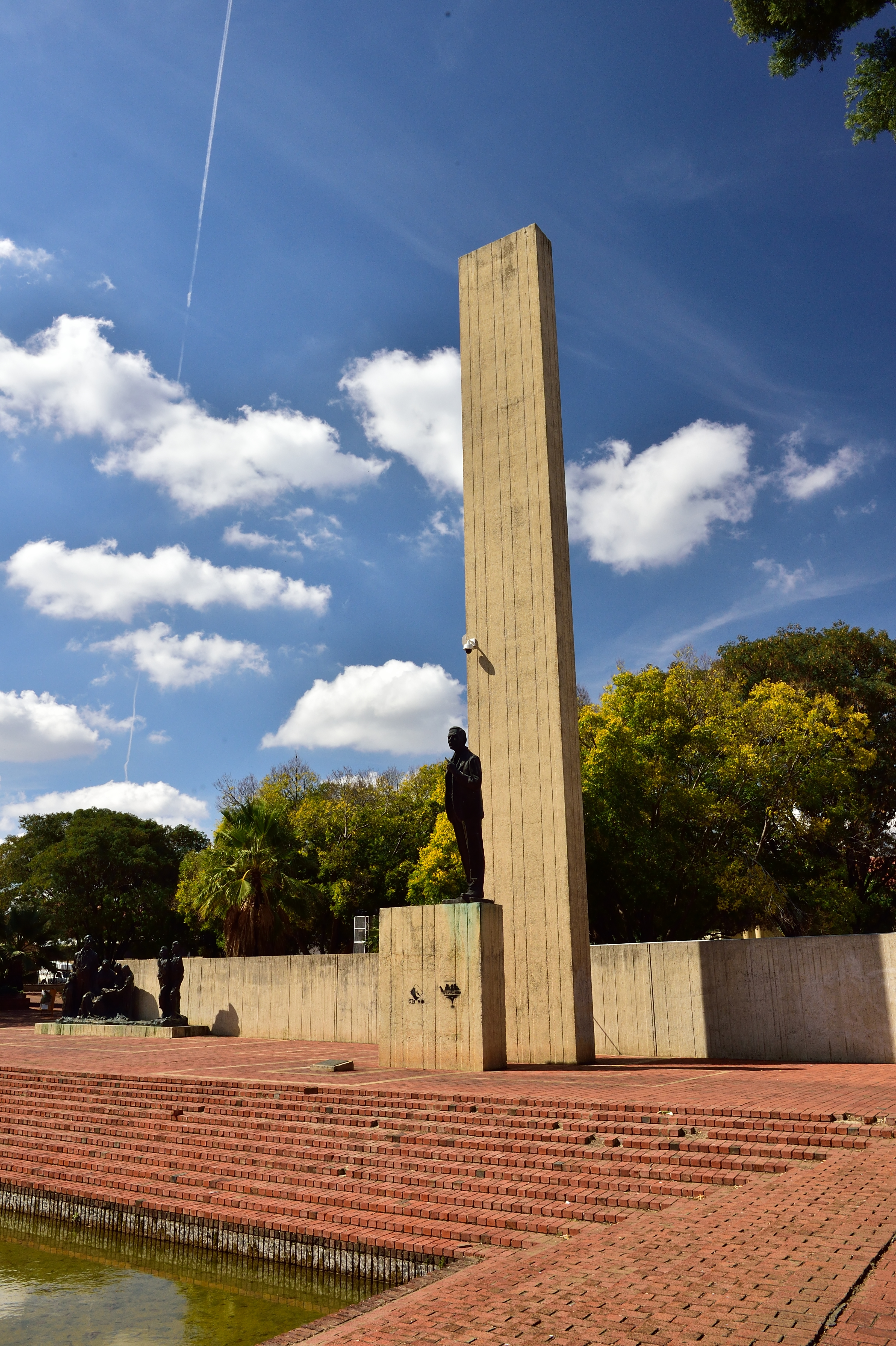 Vue du Free State en Afrique du Sud.